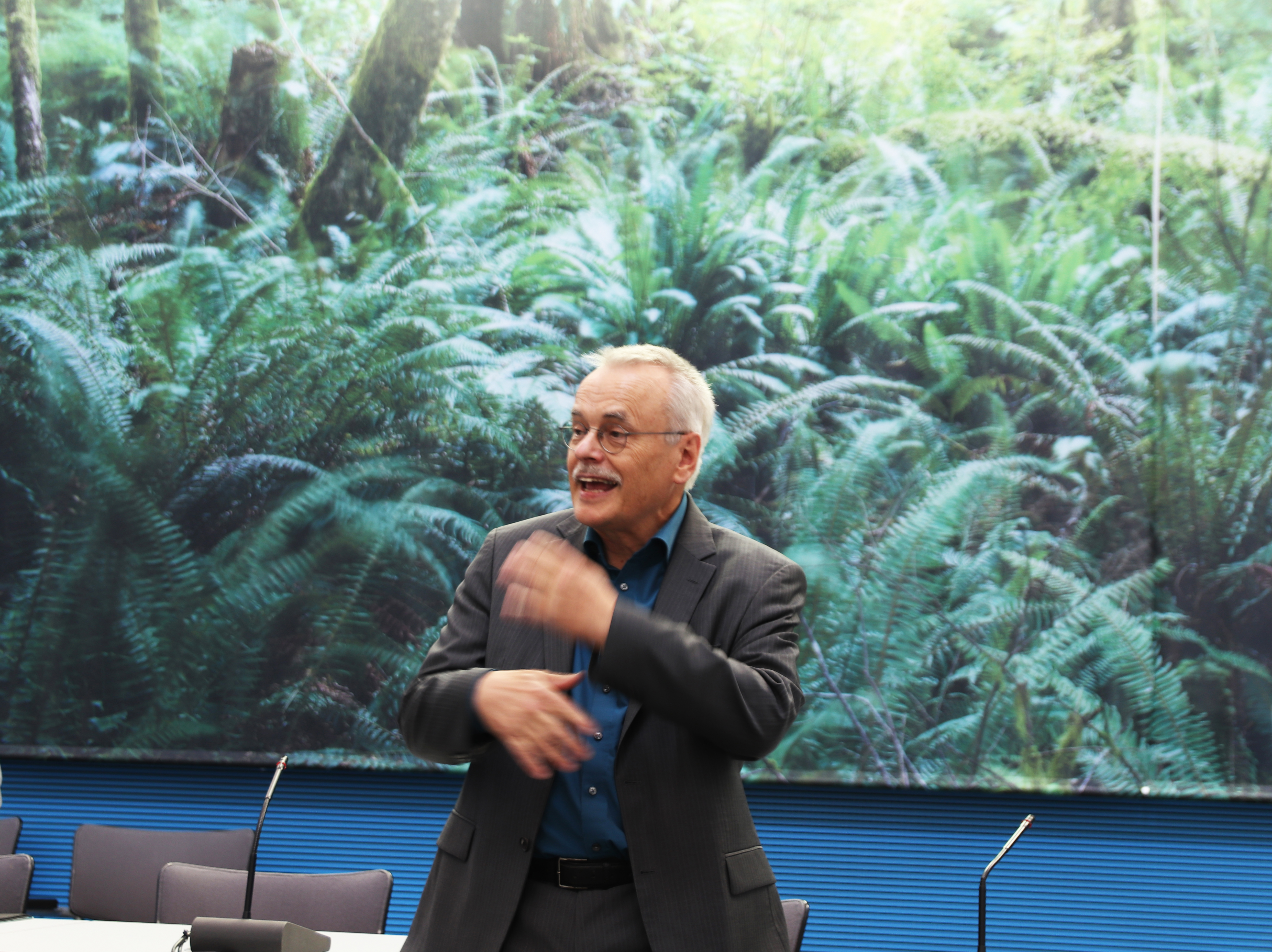 Uwe Kerkeritz bei einer Diskussion im Fraktionssaal der Grünen